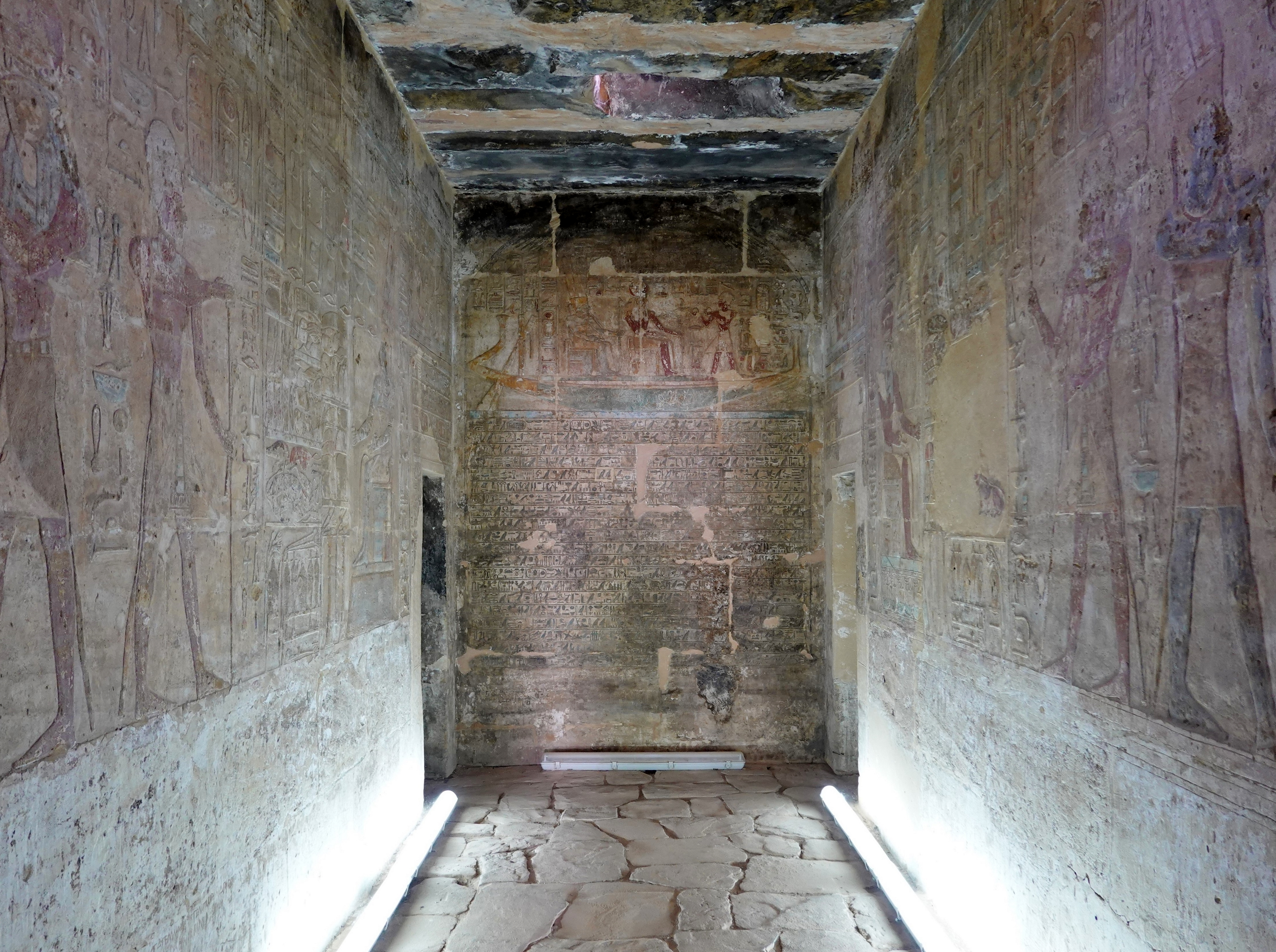 Innenraum des versetzten Tempels von Amada am Nassersee, Ägypten